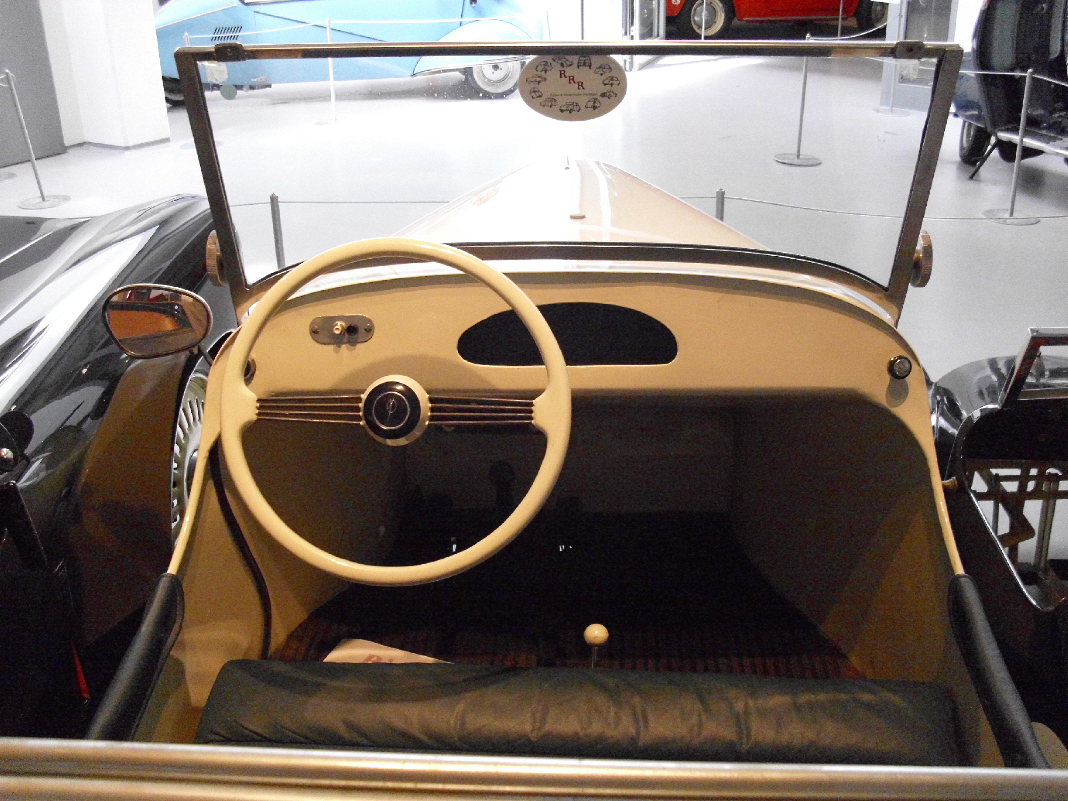 Rolux VB 60 1949 Interieur